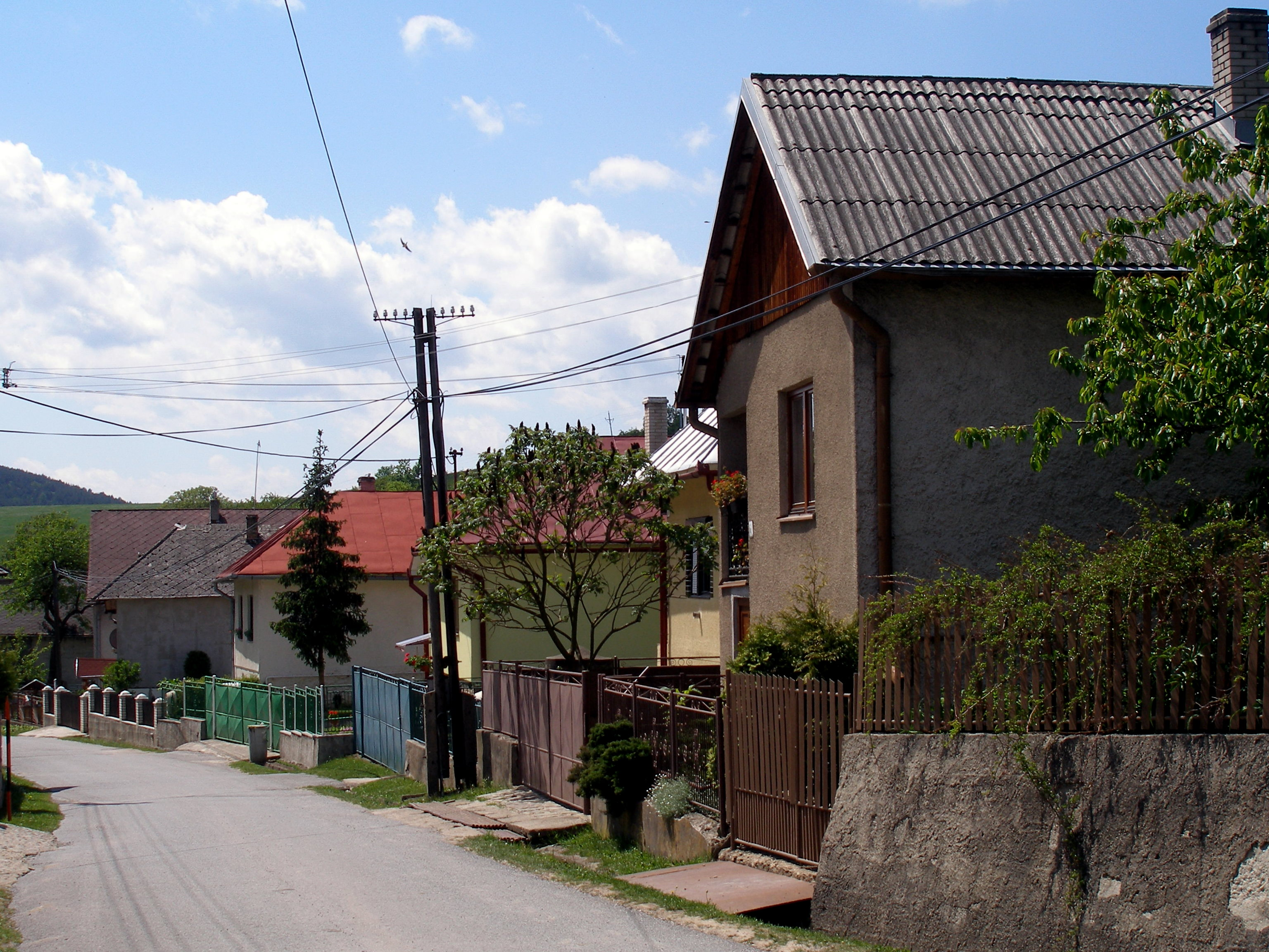 Obec Milpoš okres Sabinov.